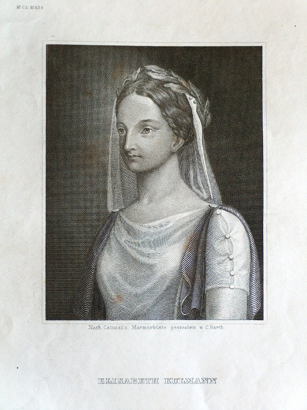 Elisabeth Kulmann, Stahlstich, Meyers Konversations-Lexikon No. 636. Portrait nach einer Marmorbüste von Paolo Catozzi (vor 1810- nach 1841)